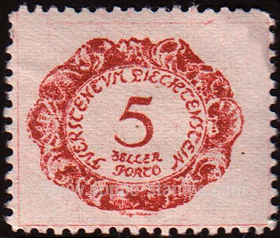 Первая доплатная марка Лихтенштейна